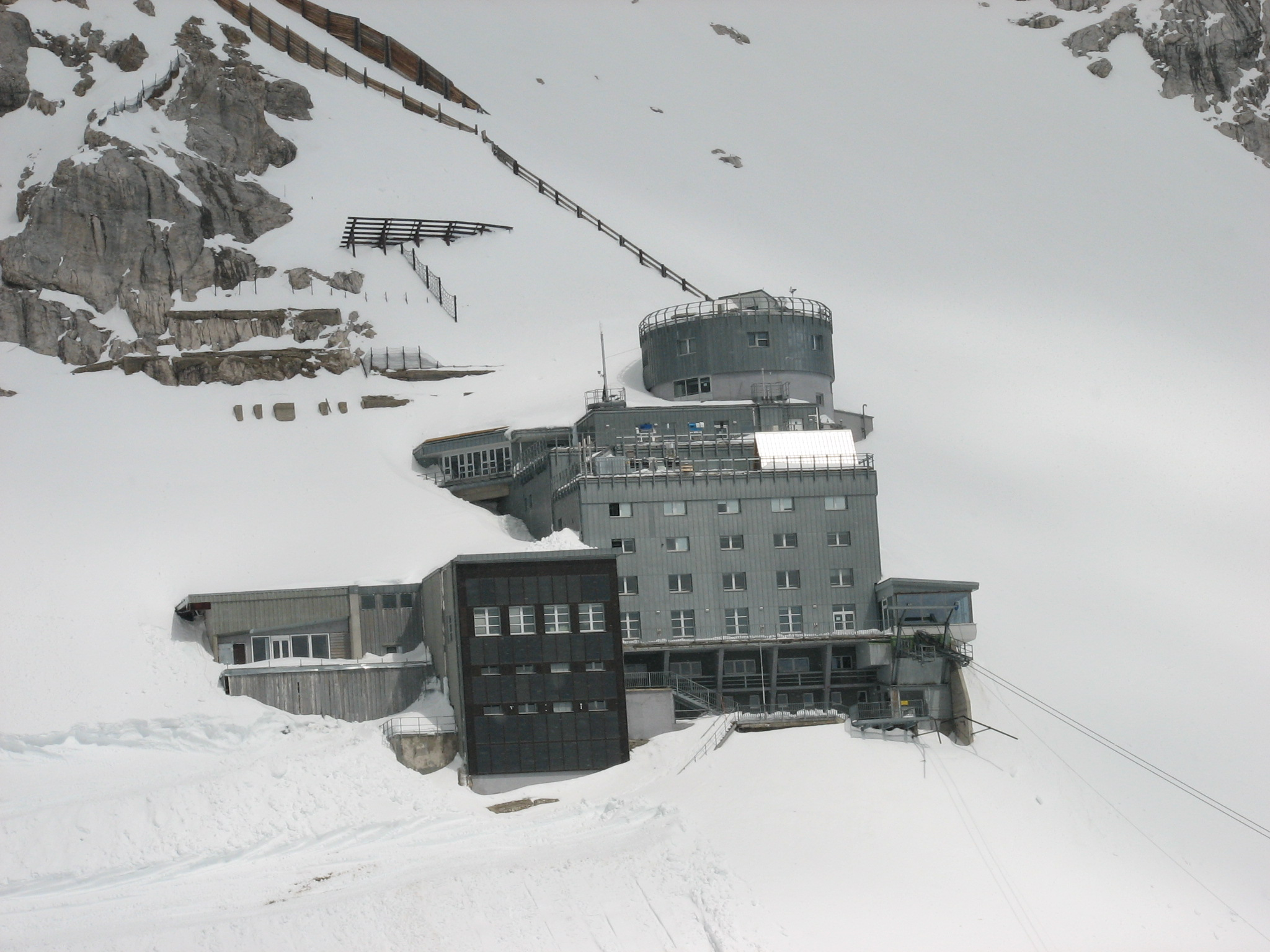 Schneefernerhaus am Zugspitzhang